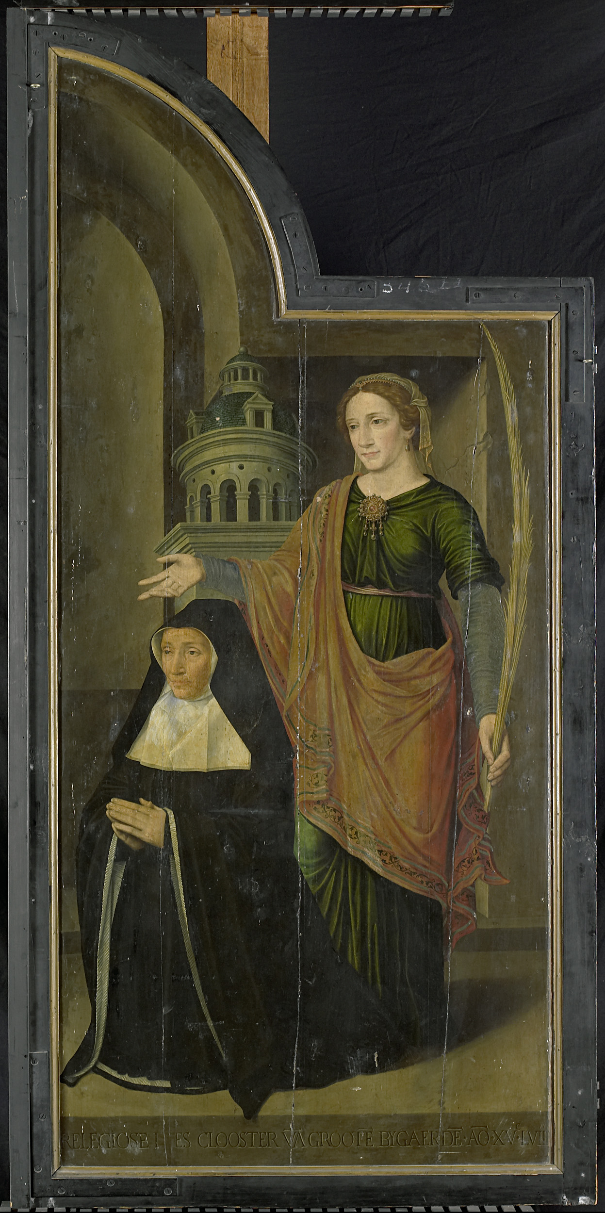 Drieluik met taferelen uit het leven van Johannes de Doper. Op het middenpaneel vermaant Johannes de Doper de Farizeeërs, hierbij ook twee discipelen en Christus. Links op de achtergrond doopt Johannes in de Jordaan. Op het linker zijpaneel de prediking van Johannes de Doper, op de voorgrond twee soldaten. Op het rechter zijpaneel de doop van Christus in de Jordaan, op de achtergrond het banket van Herodes en de onthoofding van Johannes de Doper. Op de buitenkant van het linkerluik: Johannes de Doper met het Lam Gods. Op het rechterluik: de knielende stichteres Berbel of Barbara van der Noot met de heilige Barbara. Het altaarstuk is vervaardigd voor een benedictijner klooster in Groot-Bijgaarden, bij Brussel. Met geïntegreerde lijst.